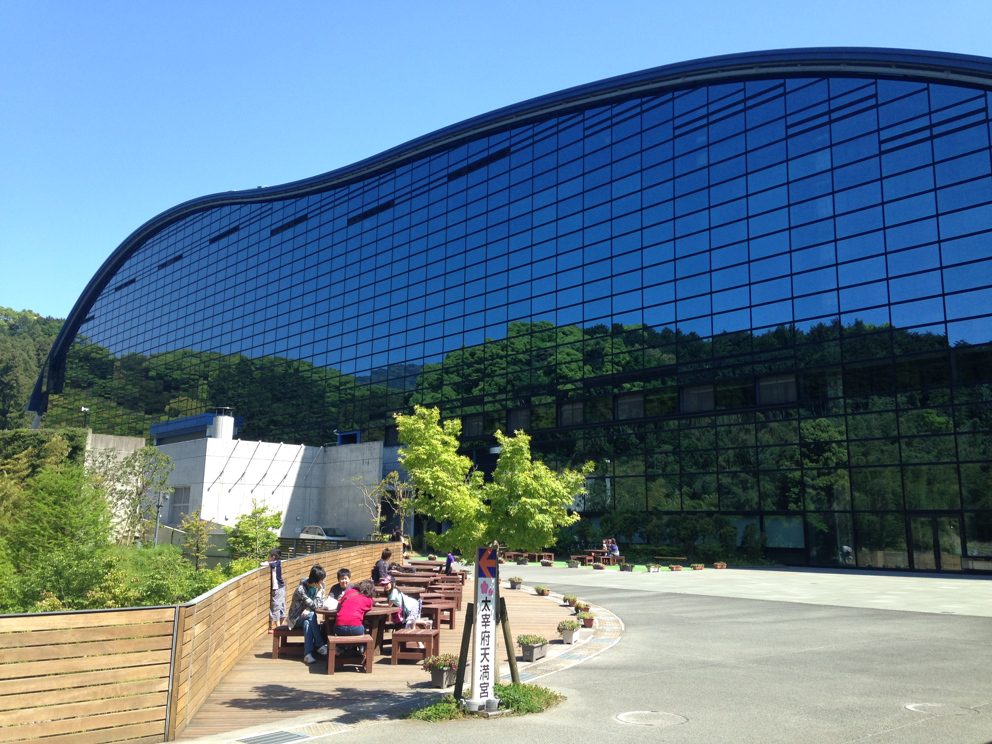 北側から望む九州国立博物館